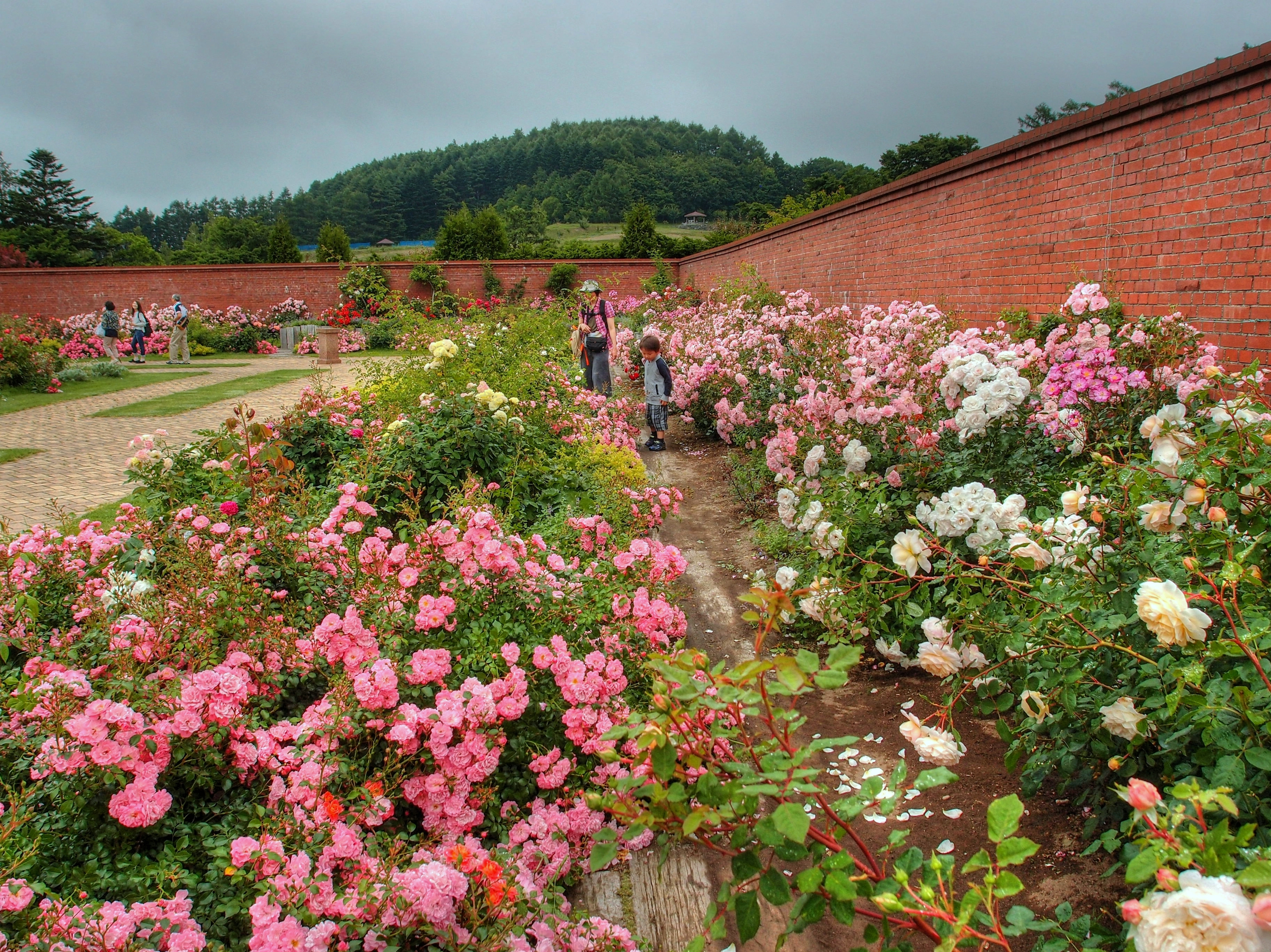 ゆにガーデン